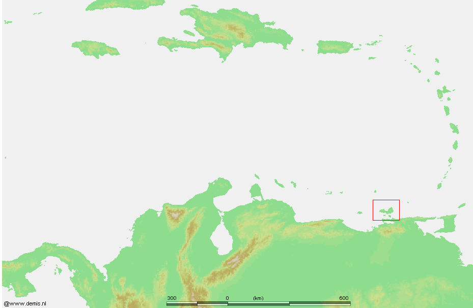 Caribbean - Isla Margarita.PNG